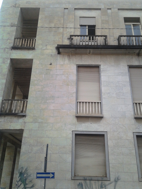 Dettaglio